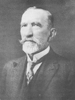 Florian Essenfelder (1855-1929) Em 1911 fundador da fábrica de pianos F. Essenfelder & Cia. Ltda, de Curitiba, Brasil Construtor do primeiro piano de cauda sul-américano em 1898 em Buenos Aires para a Exposição Nacional da Argentina Pai de Frederico "Fritz" Essenfelder, fundador do Coritiba Foot Ball Club